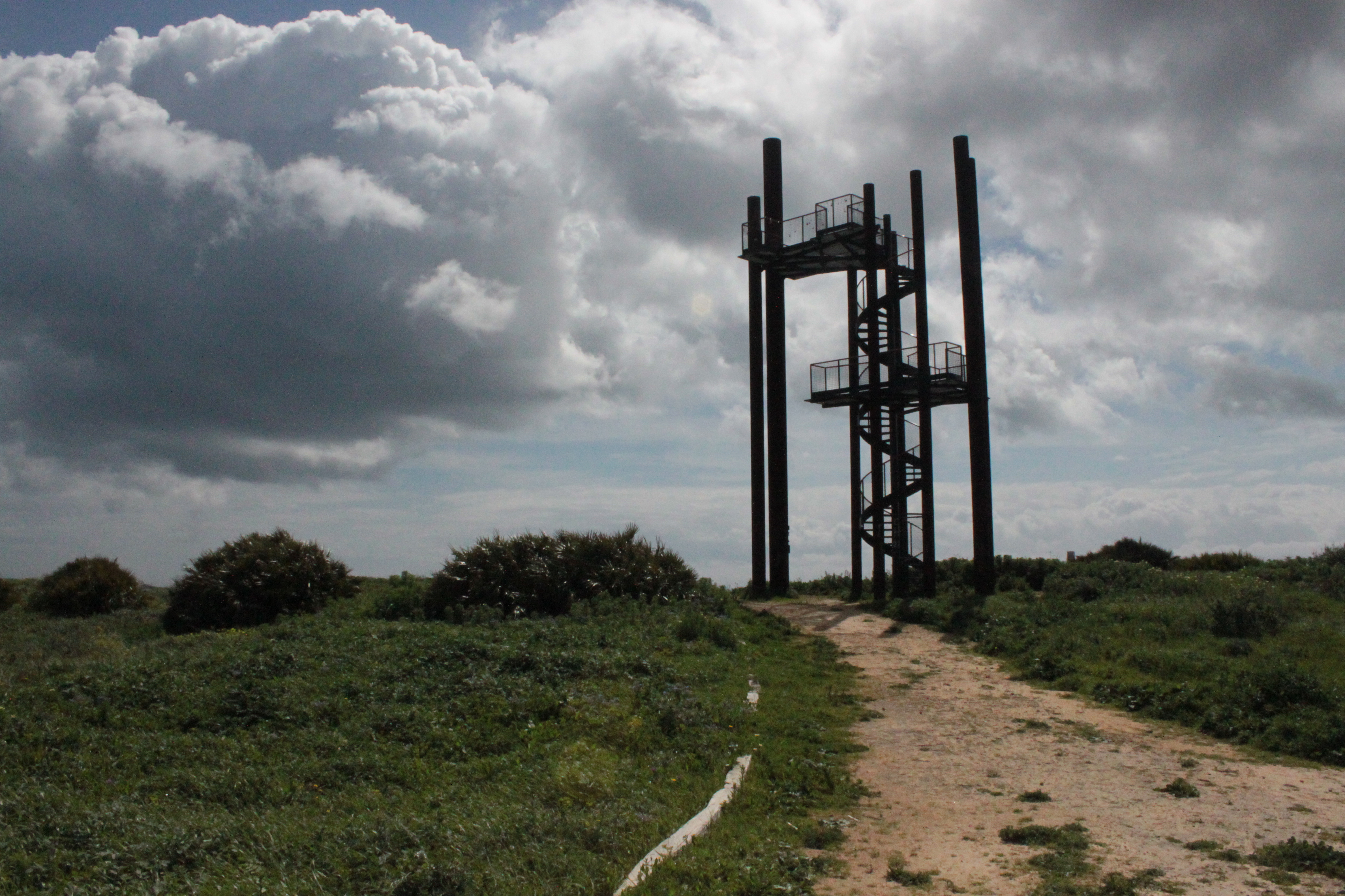 Parque del Centenario de Algeciras, España. Torre mirador construida en 2006 situada en las inmediaciones de la antigua torre de San García.